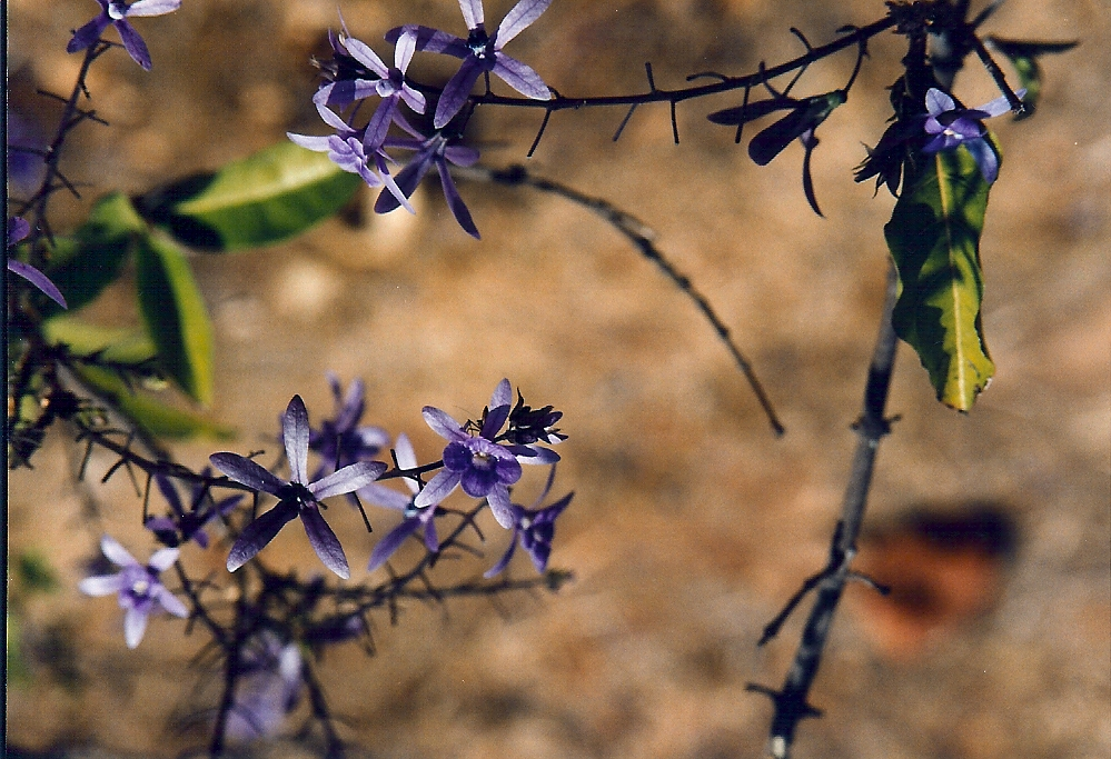 Petrea volubilis. Taken 1996 on film.